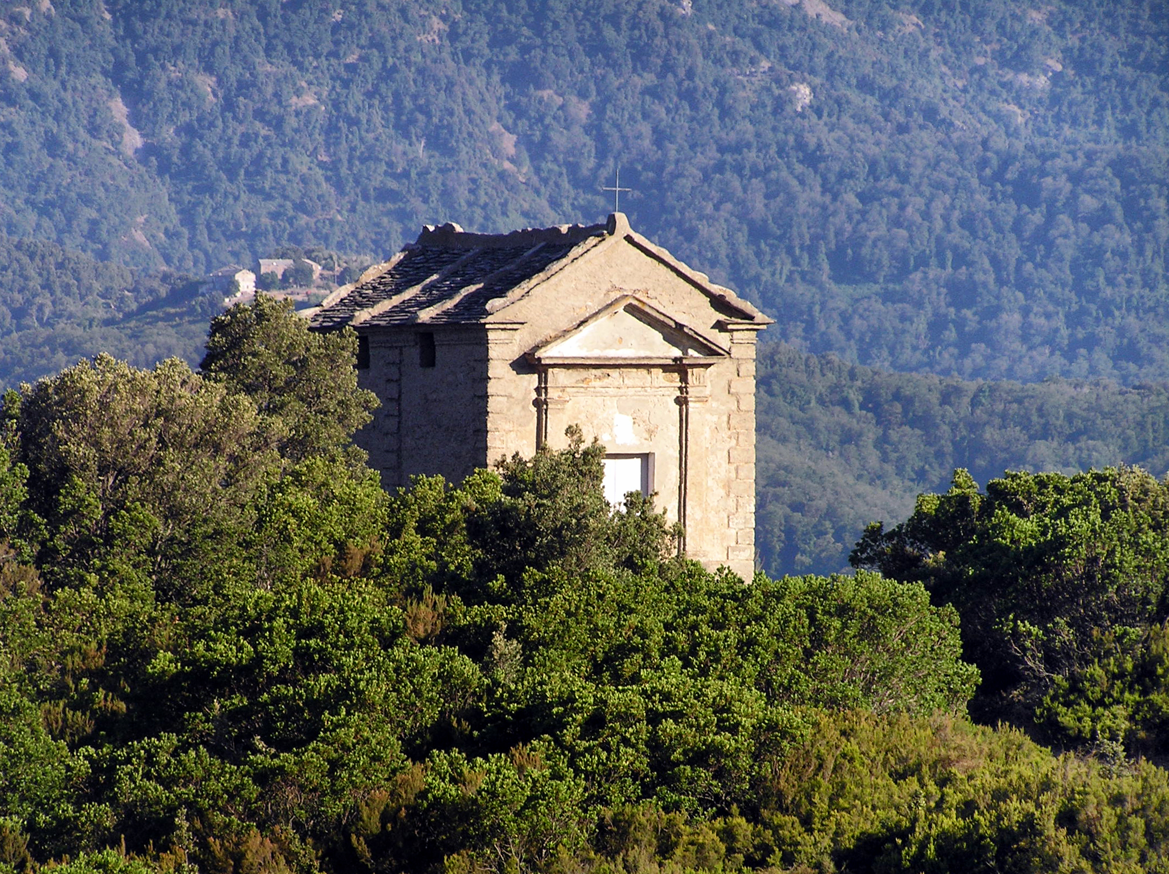 Piano, Castagniccia (Haute-Corse) - Chapelle San Giorgio (San Ghjorghju)